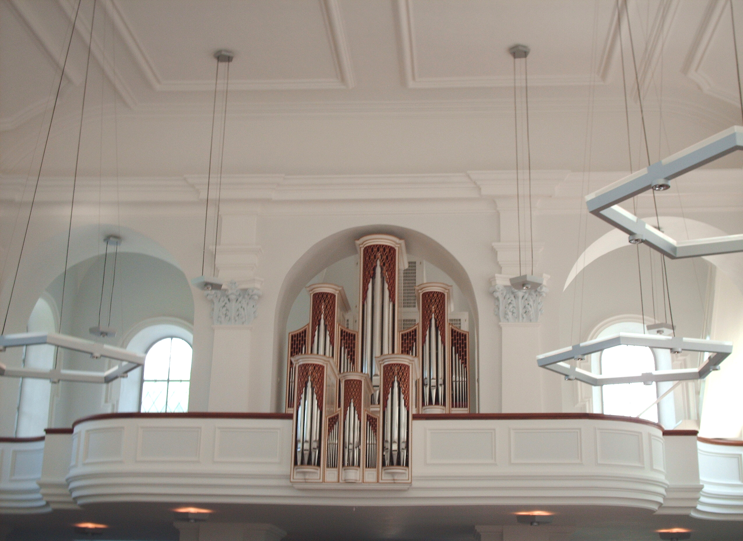 Reformierte Kirche Baden, Empore